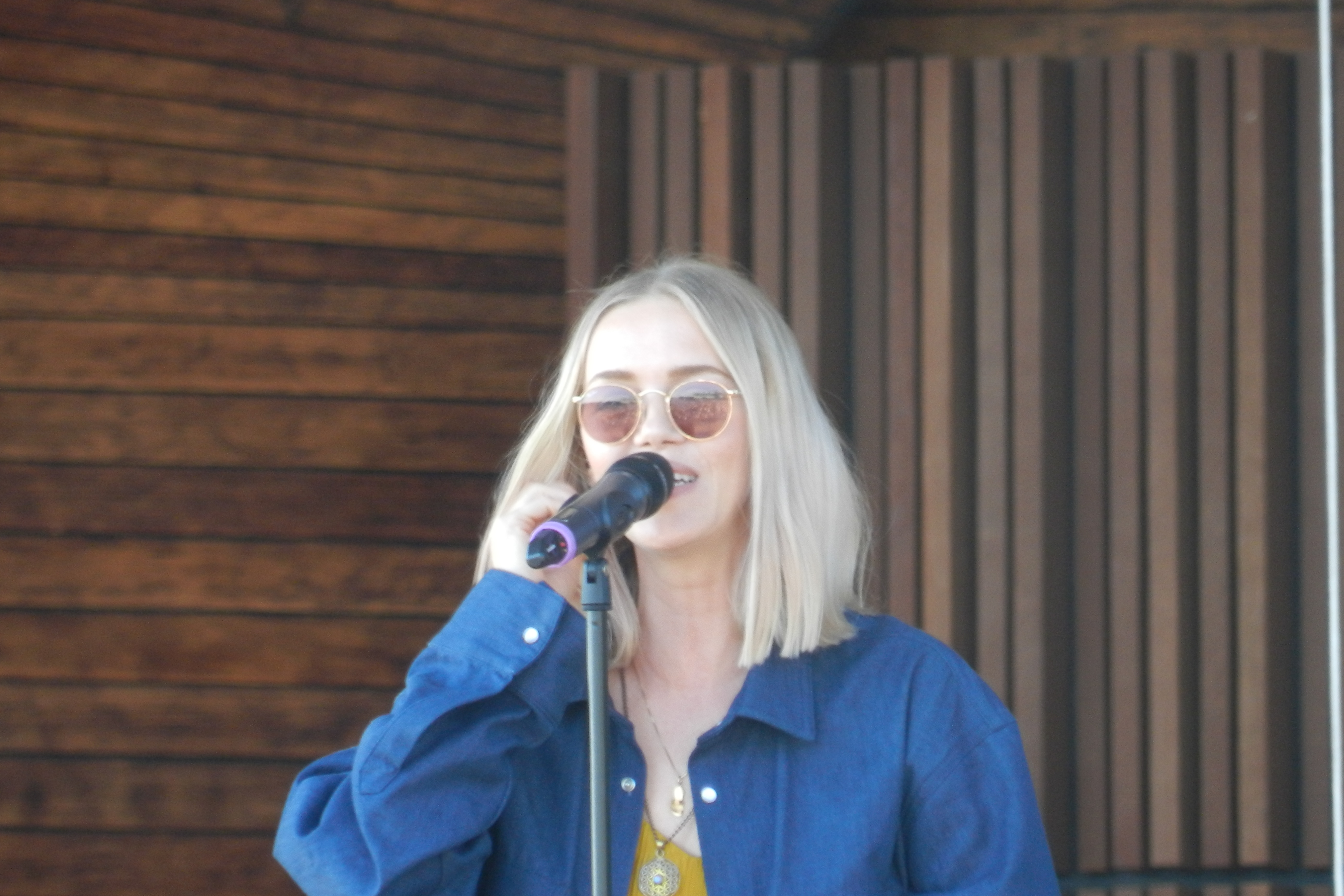 Ana Diaz, september 2018